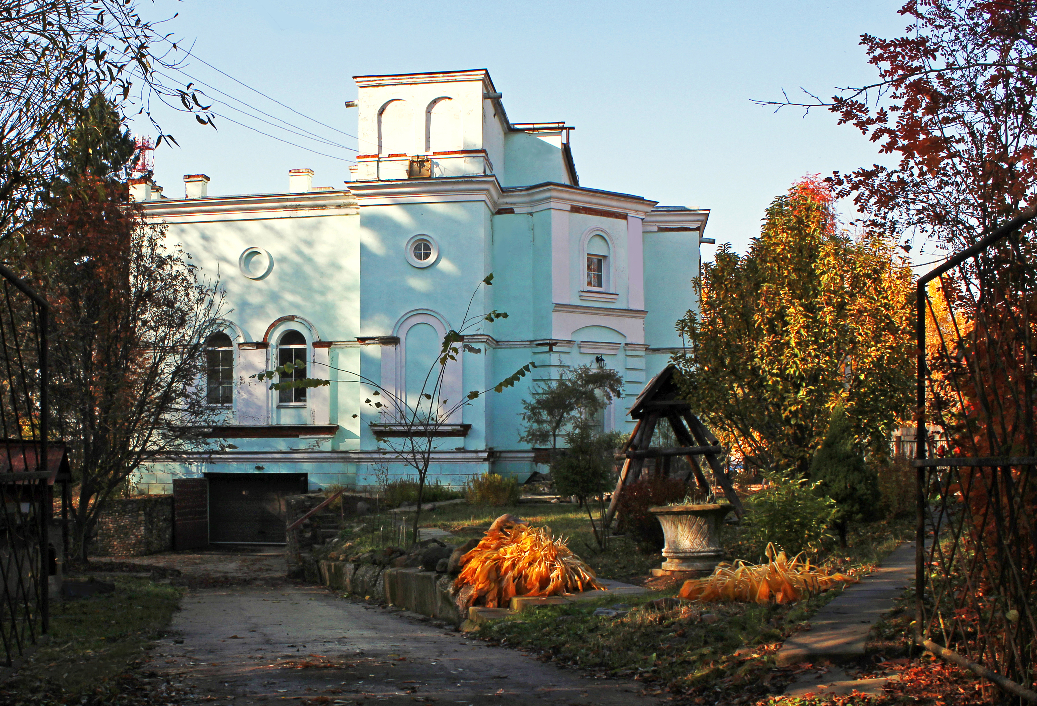 Дом-музей Седнина Н.Н. фото